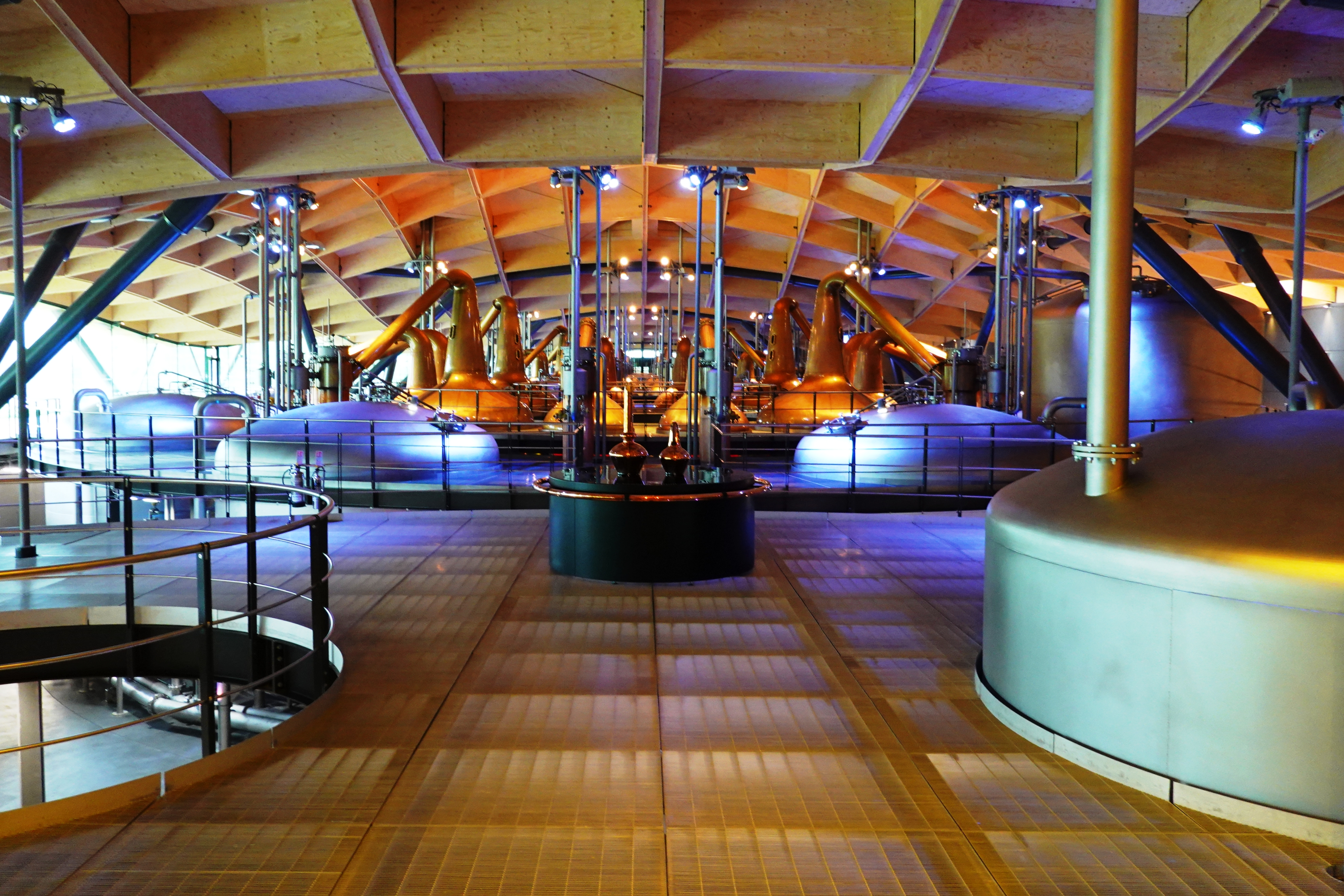 חלק מאולם הייצור